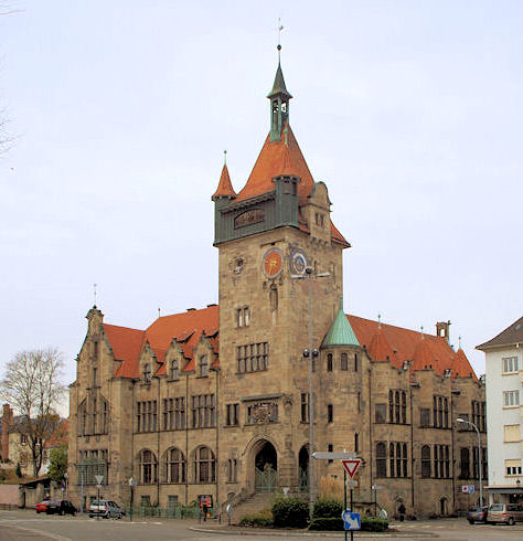 Haguenau - Teatr